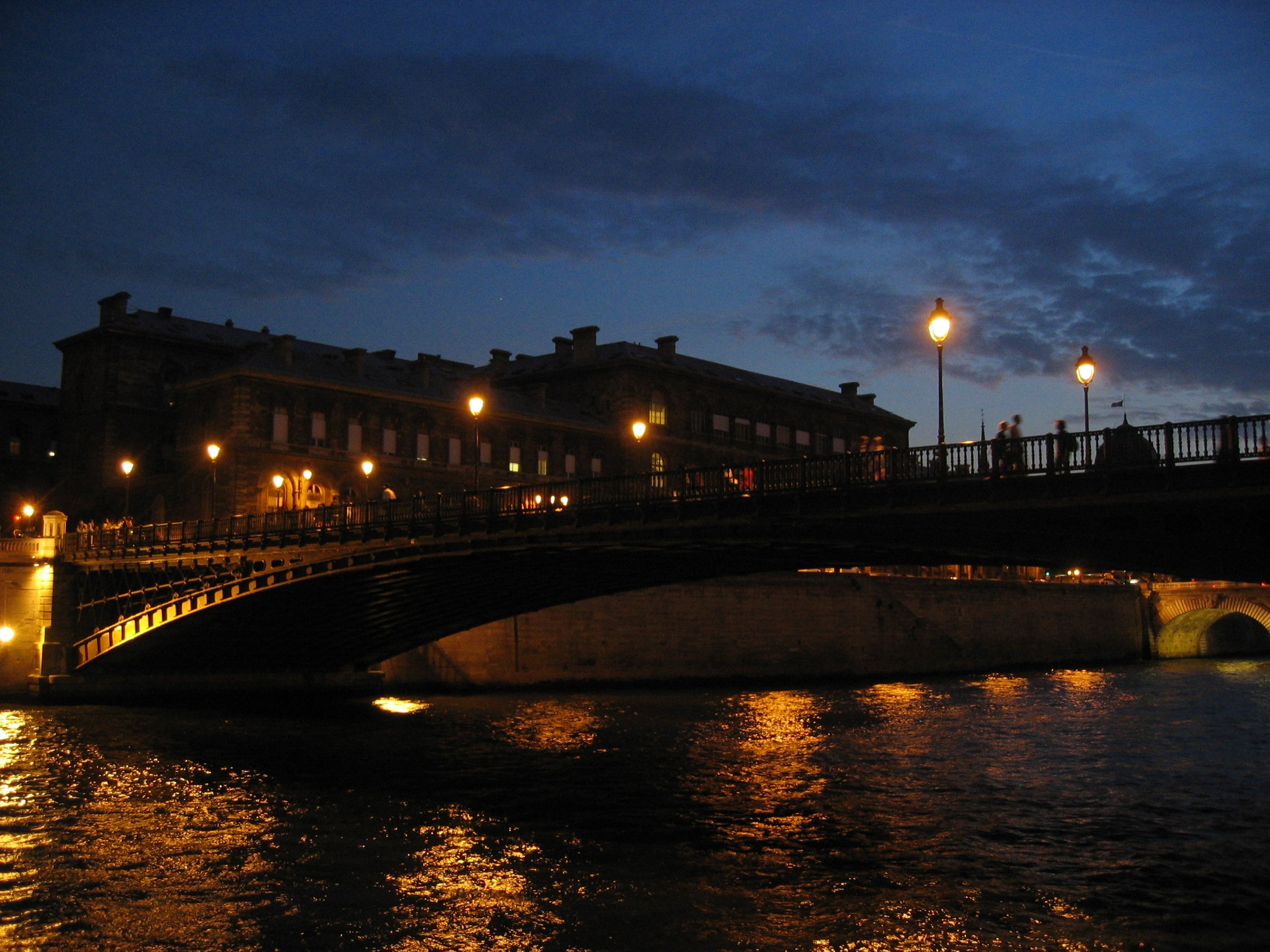 Photo du Pont d'Arcole de nuit.